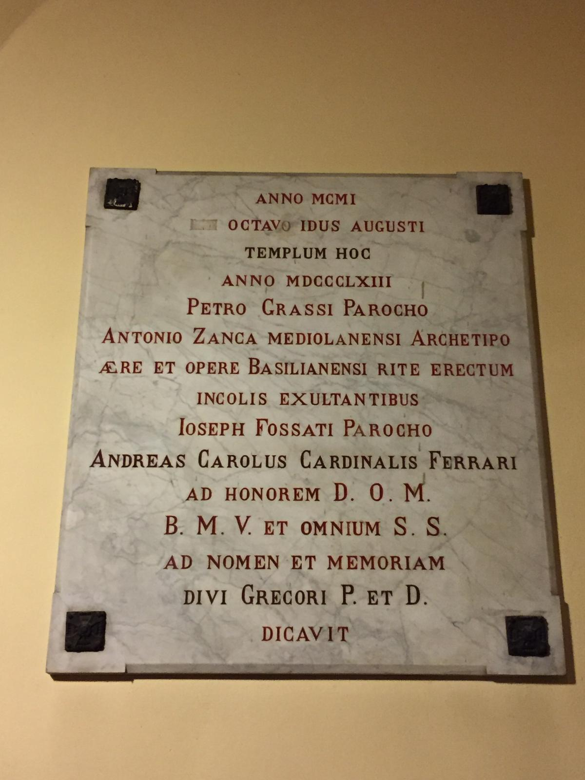 lapide Basiano